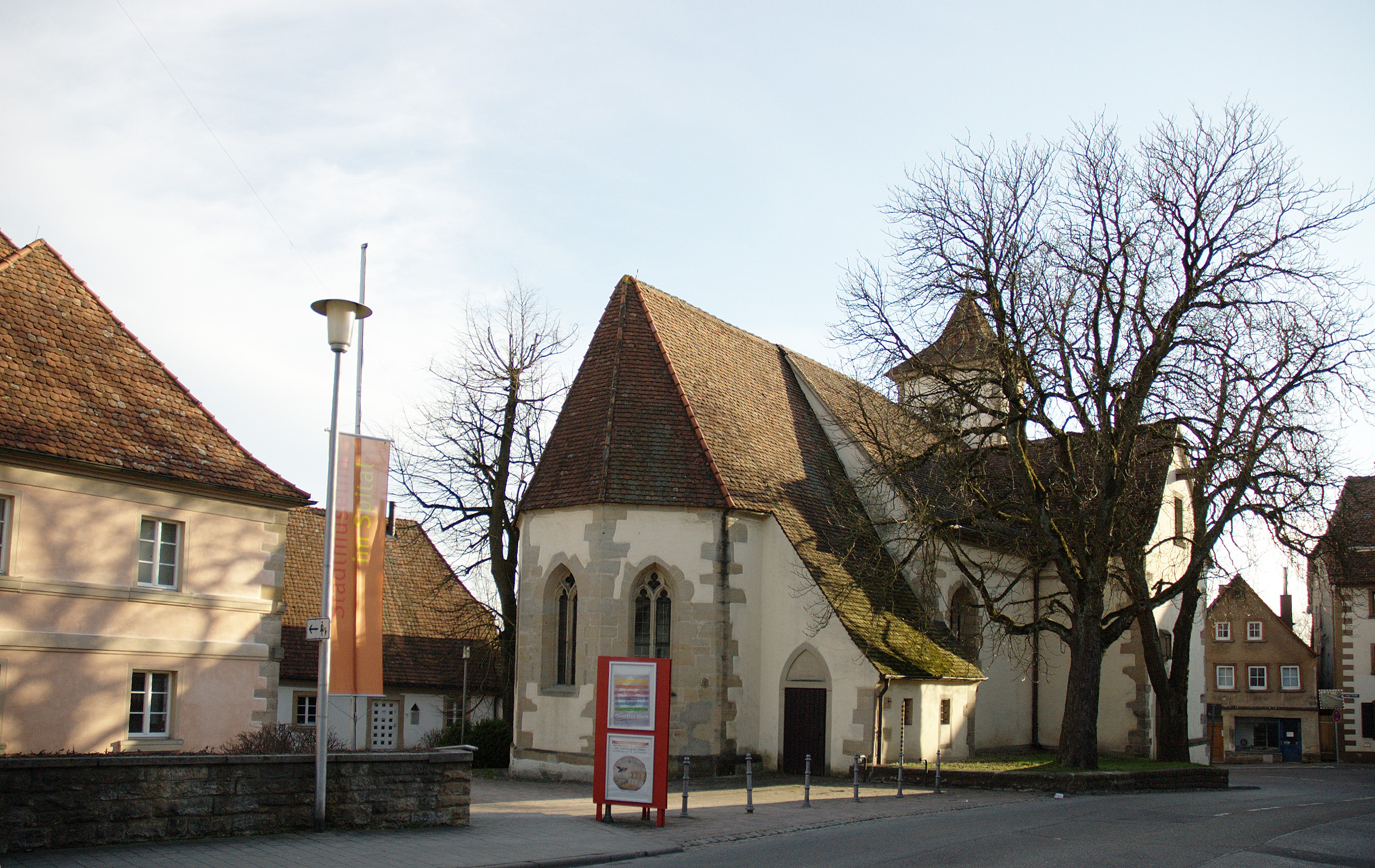 Spitalkapelle Crailsheim